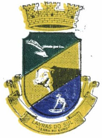 Brasão de Lavras do Sul